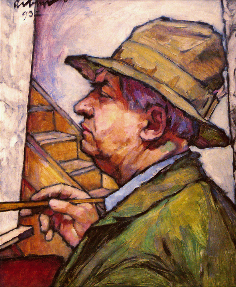 Self-portrait